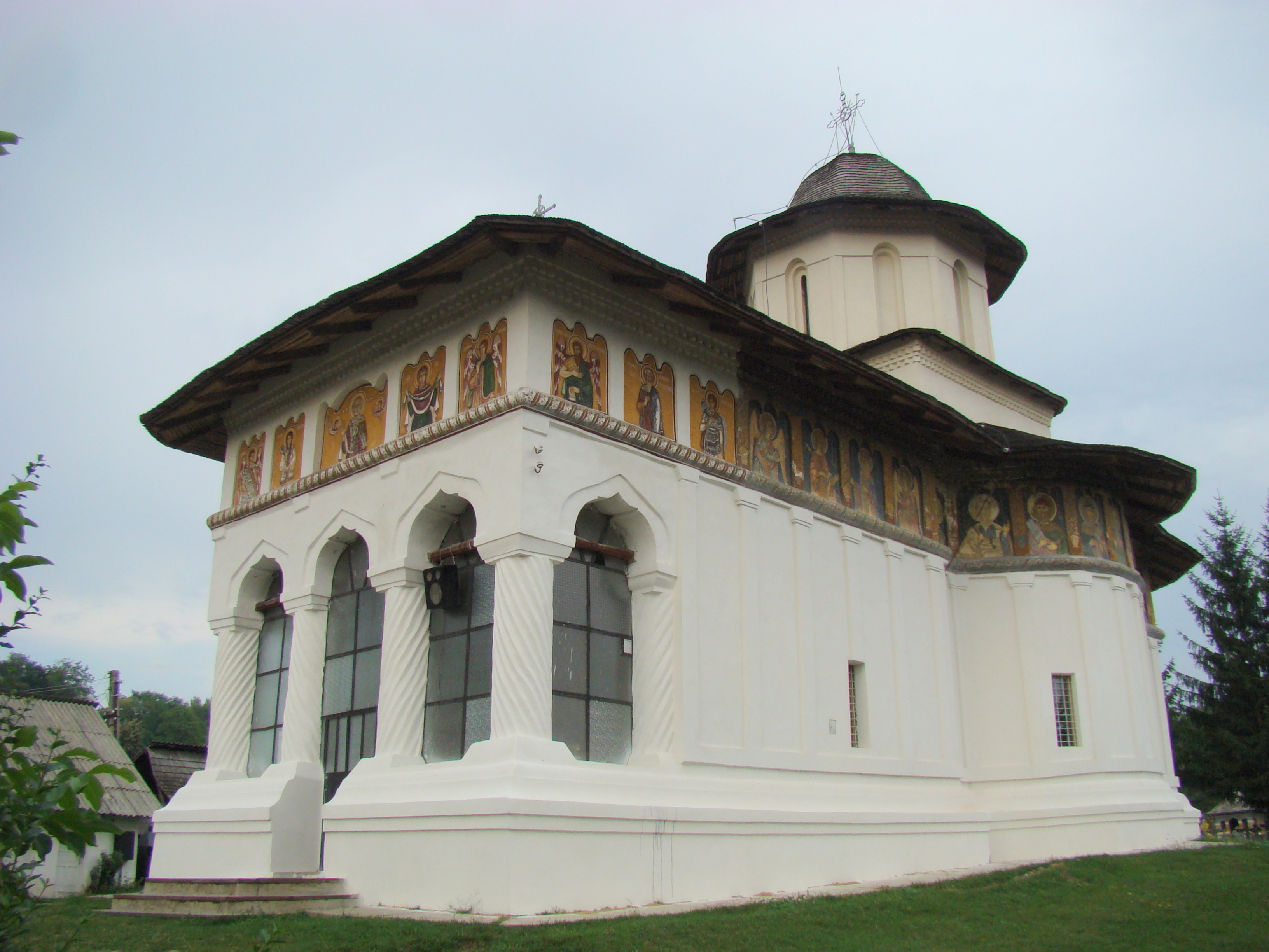 Ansamblul bisericii cu hramurile "Sf. Filofteia" și Sf. Nicolae", sat Valea Danului; comuna Valea Danului, județul Argeș